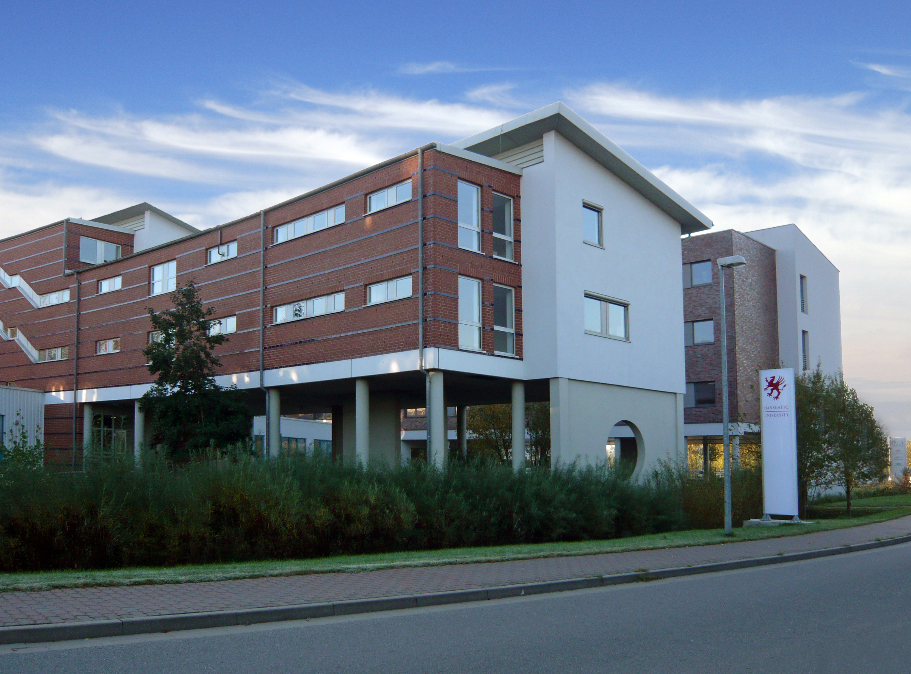 Hauptgebäude der Privaten Hanseuniversität in Rostock-Warnemünde / Frontseite / Germany